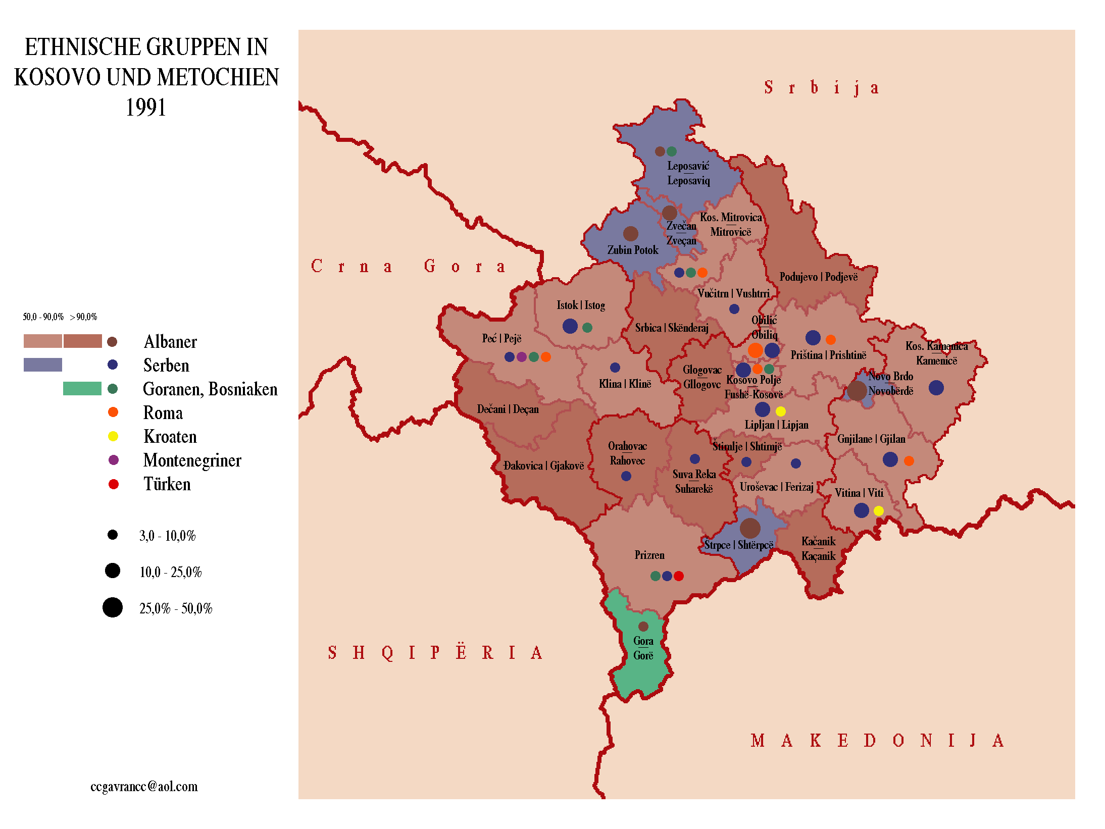 Ethnische Karte Kosovo und Metochien